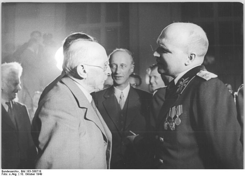 ADN-ZB/SNB Gründung der Deutschen Demokratischen Republik am 7.10.1949. Armeegeneral W.J. Tschuikow empfing am 10.10.1949 in Berlin-Karlshorst das Präsidium der Provisorischen Volkskammer der Deutschen Demokratischen Republik und den Ministerpräsidenten Otto Grotewohl in Anwesenheit des Außerordentlichen Botschafters der UdSSR in Deutschland W.S. Semjonow. UBz: Der Außerordentliche Botschafter der UdSSR, W.S. Semjonow (r) im Gespräch mit dem stellvertretenden Vorsitzenden der CDU, Prof. Hugo Hickmann (l) und dem Präsidenten der Provisorischen Volkskammer 4153-49